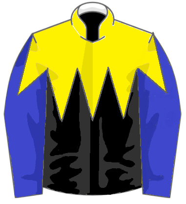 金子真人HDの勝負服